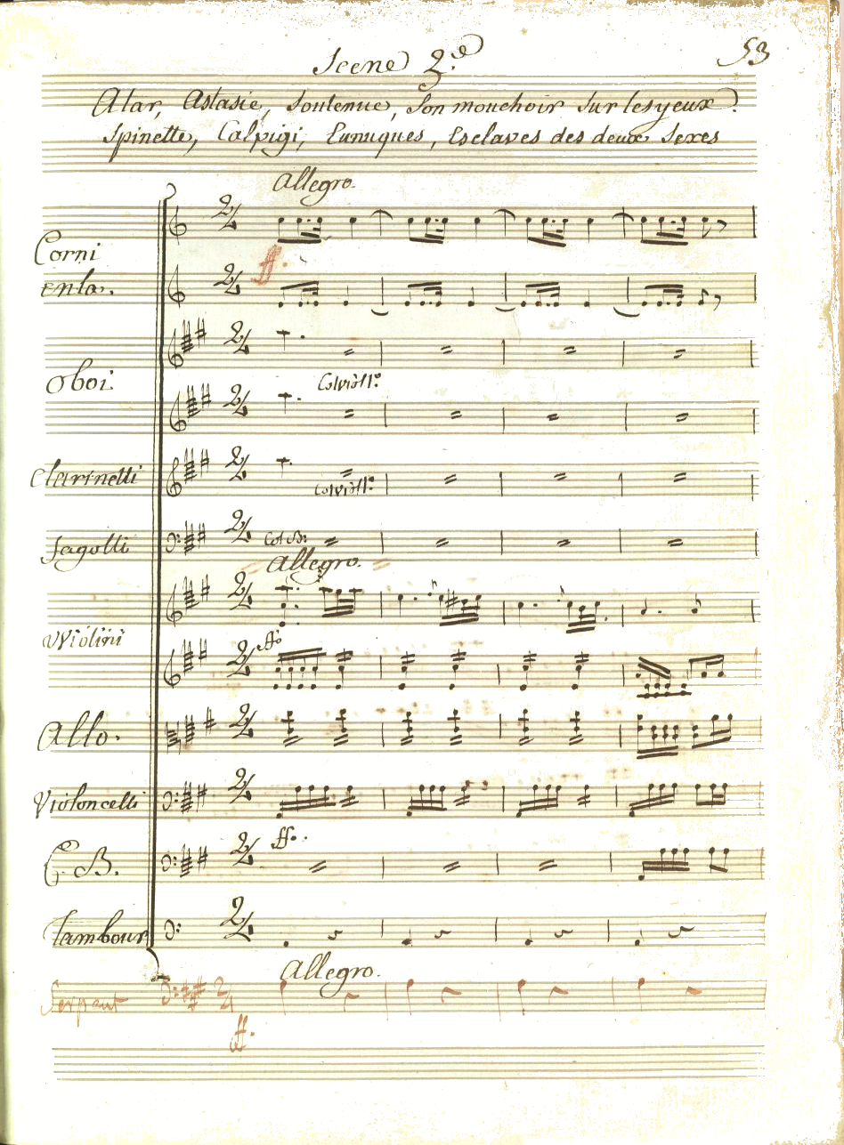 Partition autographe de Tatare d'Antonio Salieri (Acte III, scène 3). Manuscrit BnF.